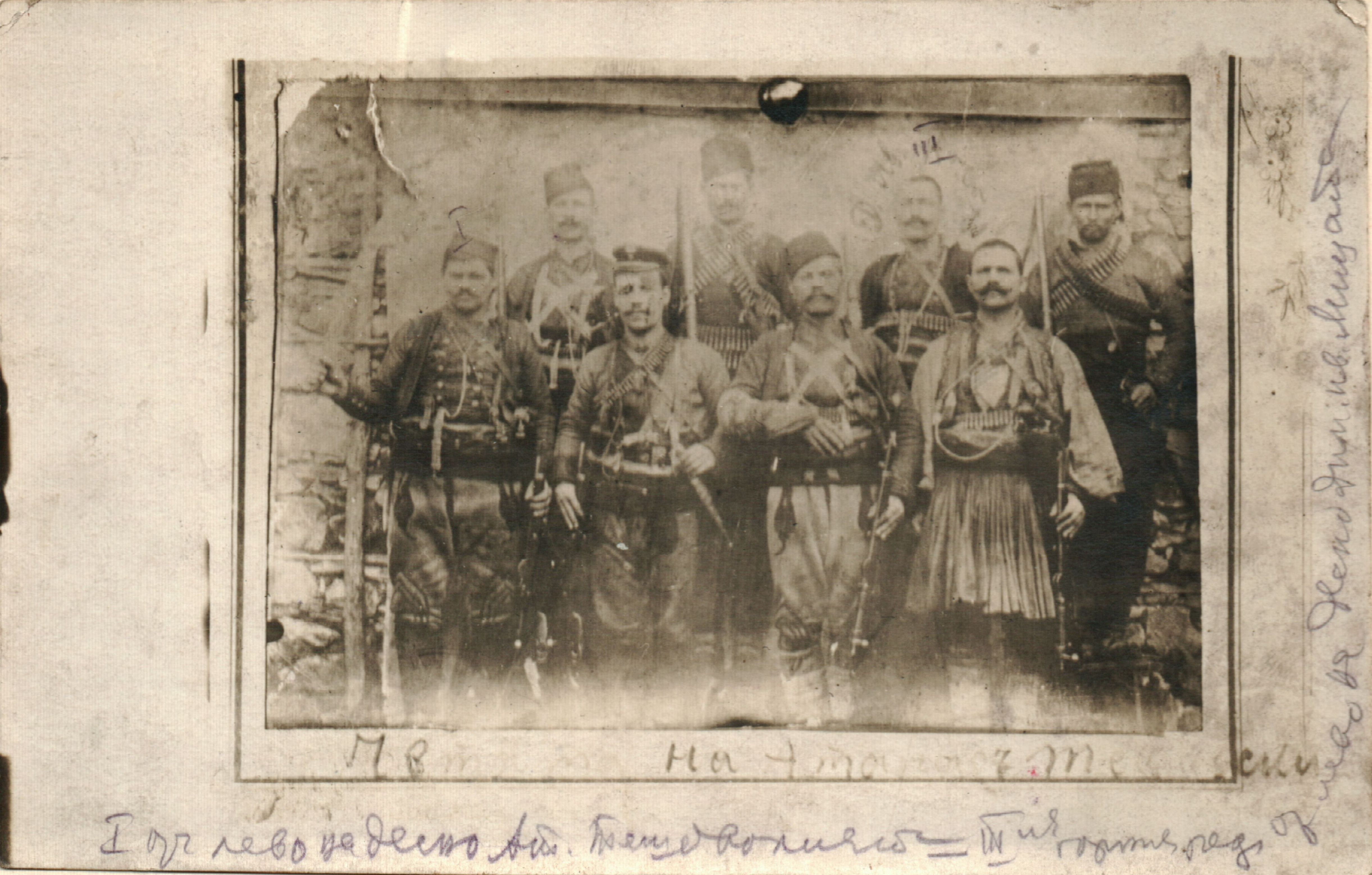 Снимка на четата на Атанас Тешовалията.